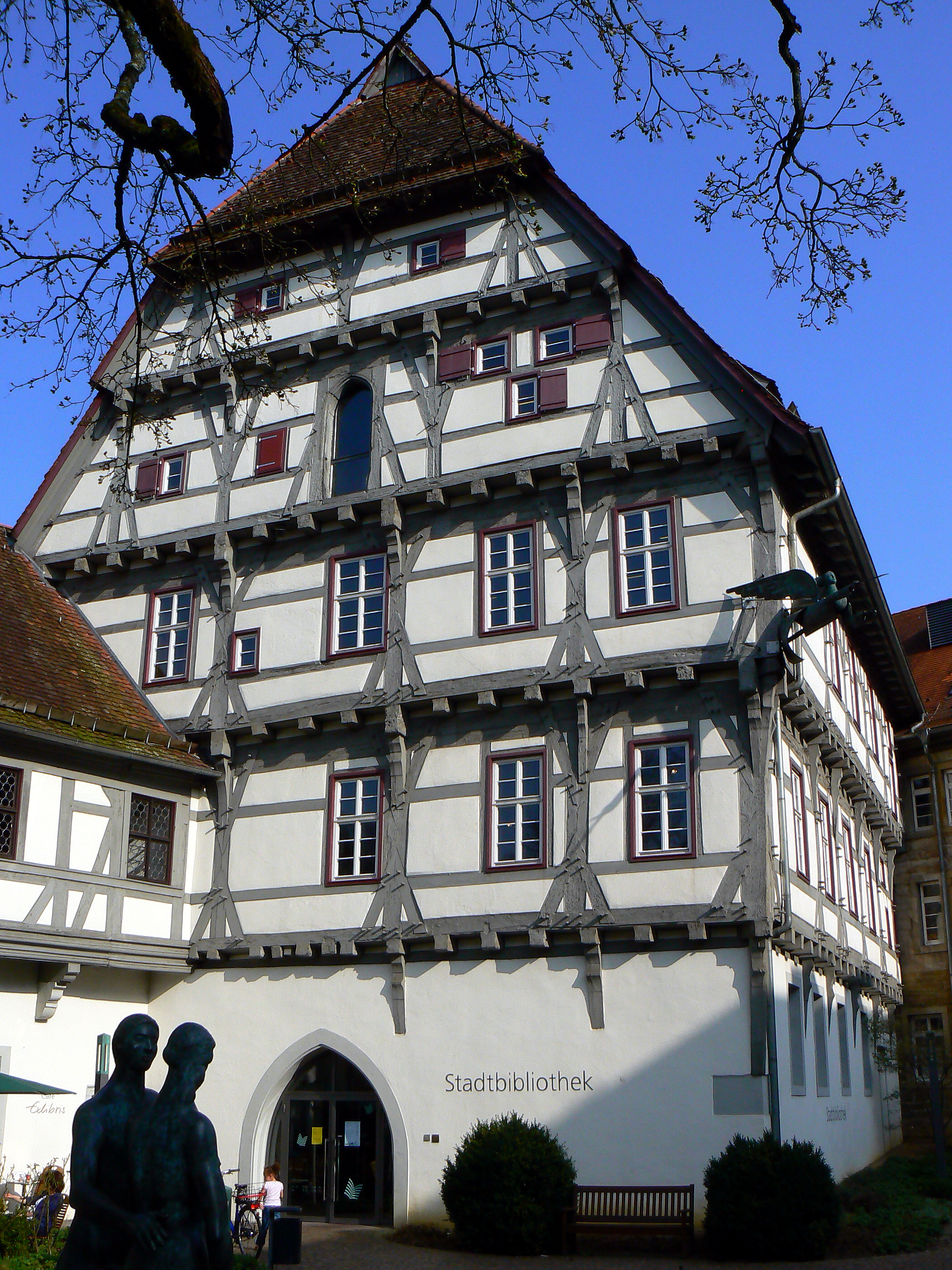 Schwäbisch Gmünd, Stadtbibliothek (Spitalhof)